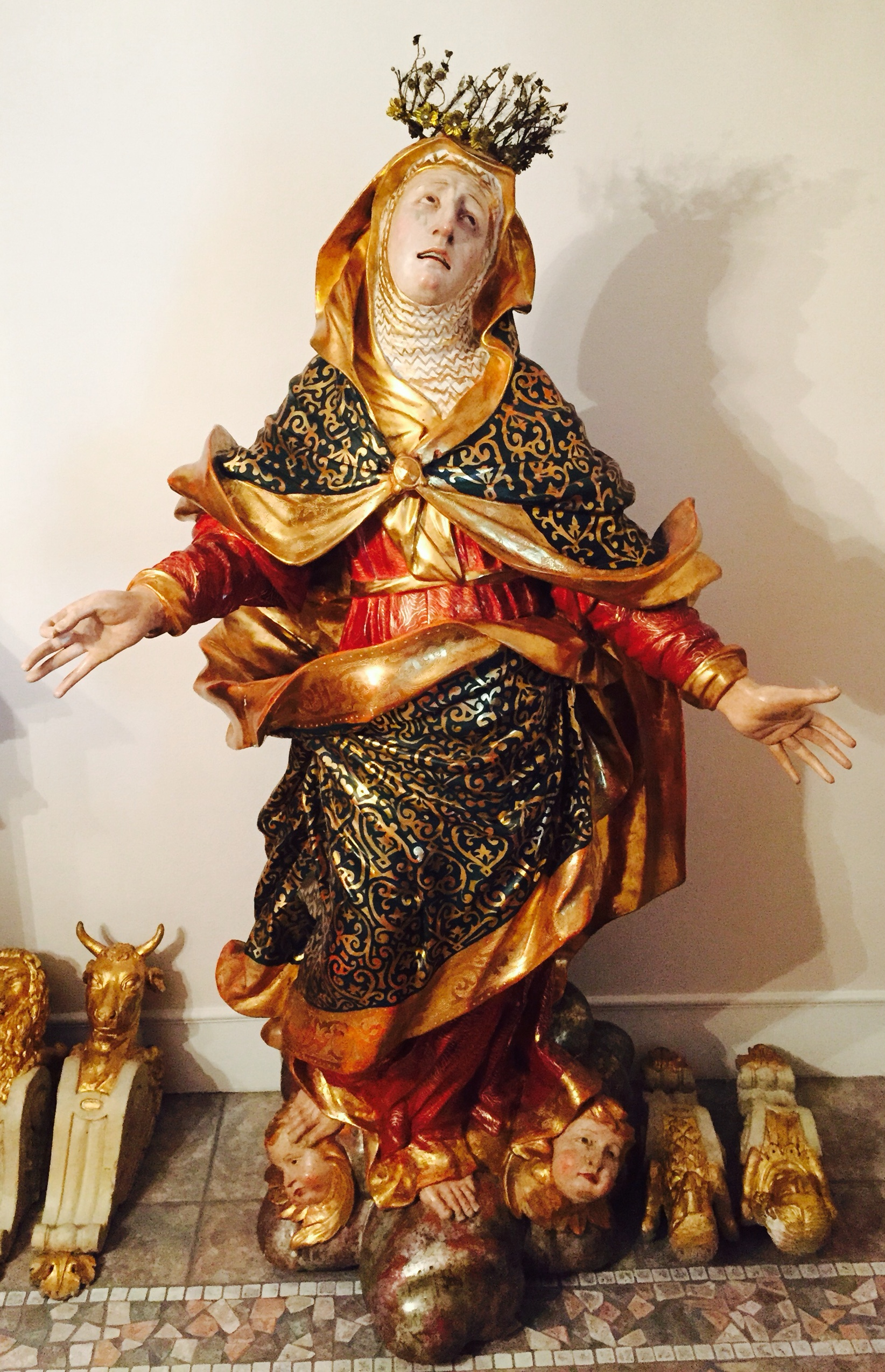 Statua lignea dell’Addolorata